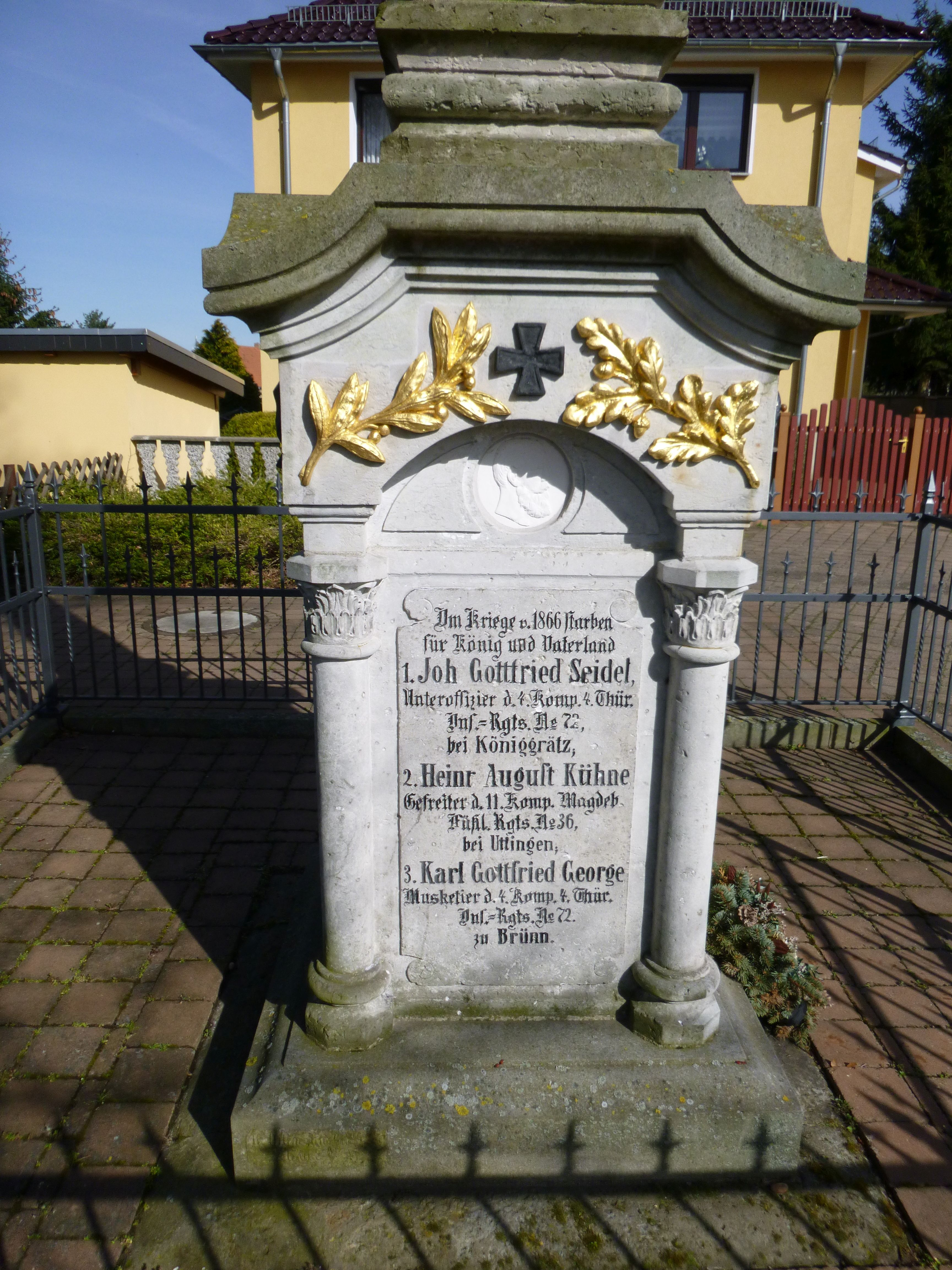 Kriegerdenkmal Gröden